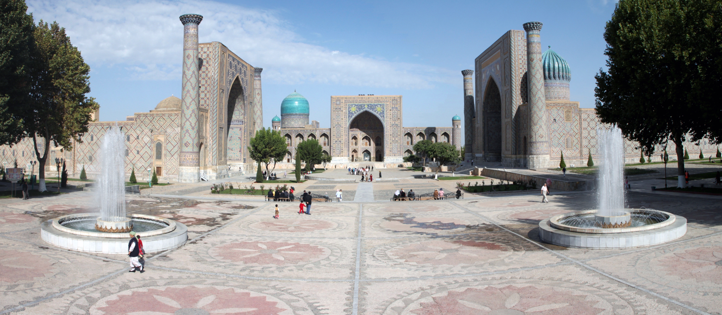 Registan, in Samarcand, Uzbekistan